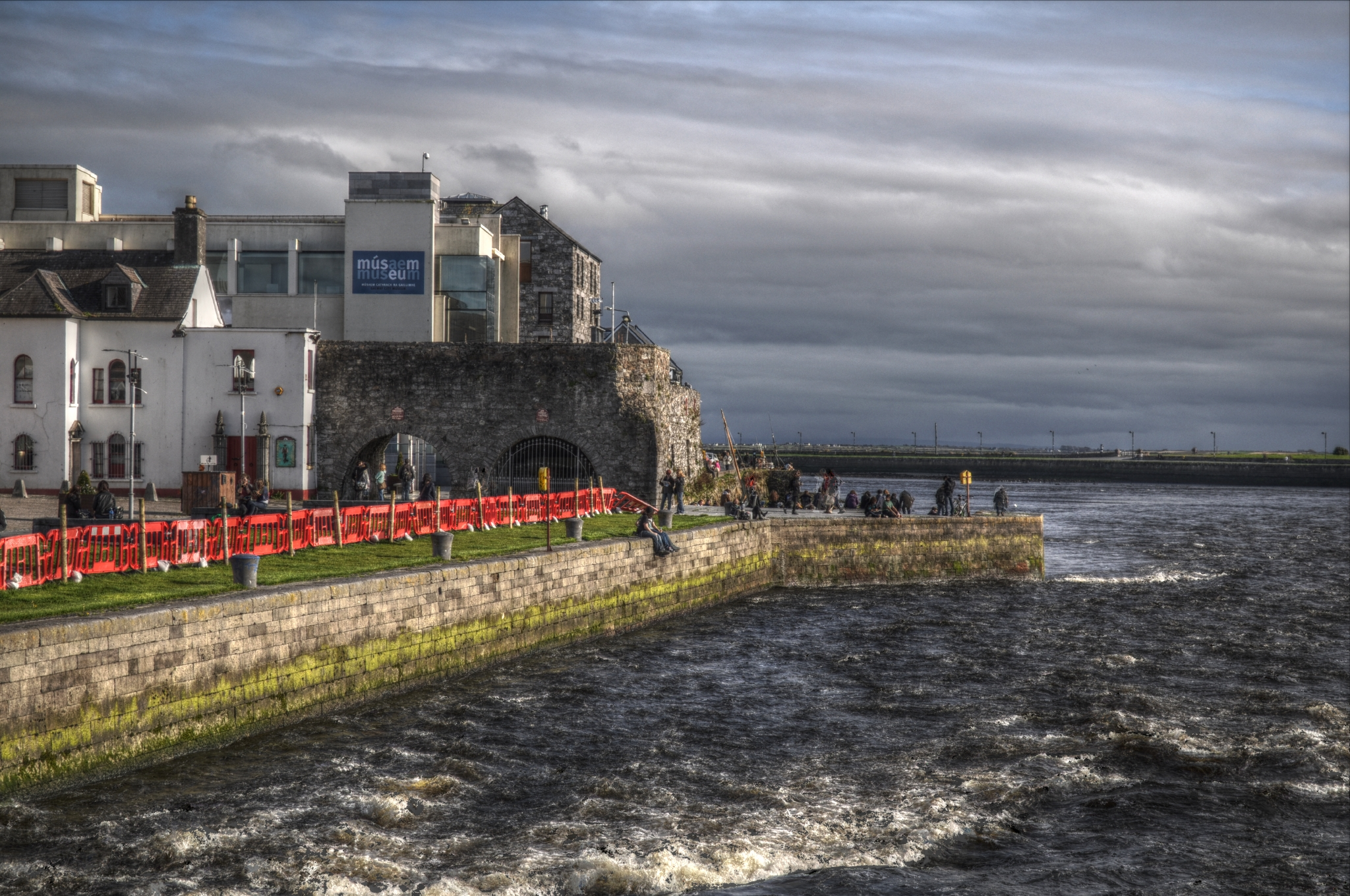 Camera: Nikon D5000 3 exposures: -2, 0, 2 EV Luminance HDR: Mantiuk'06